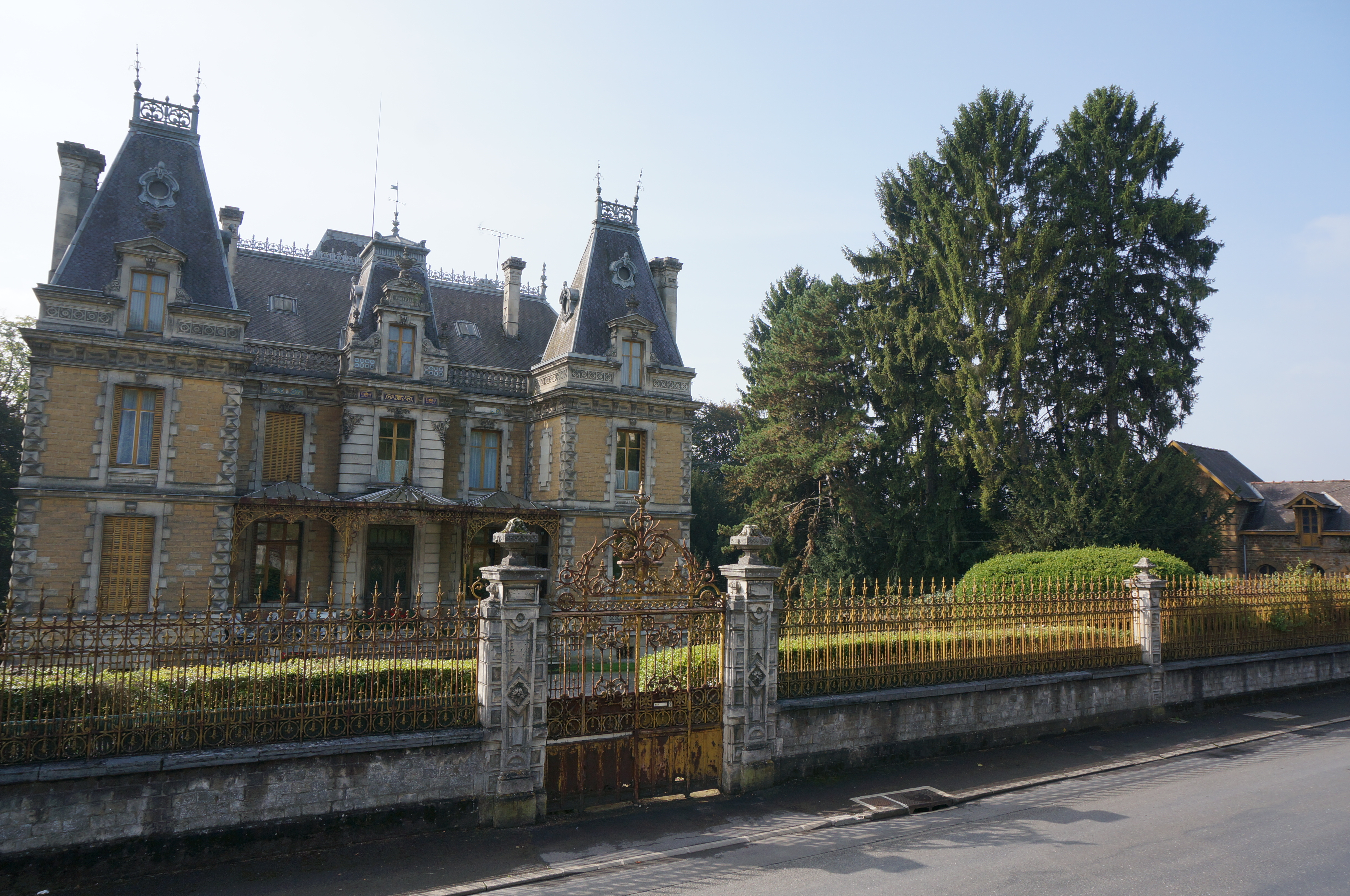 D2I à Vivier-au-Court .